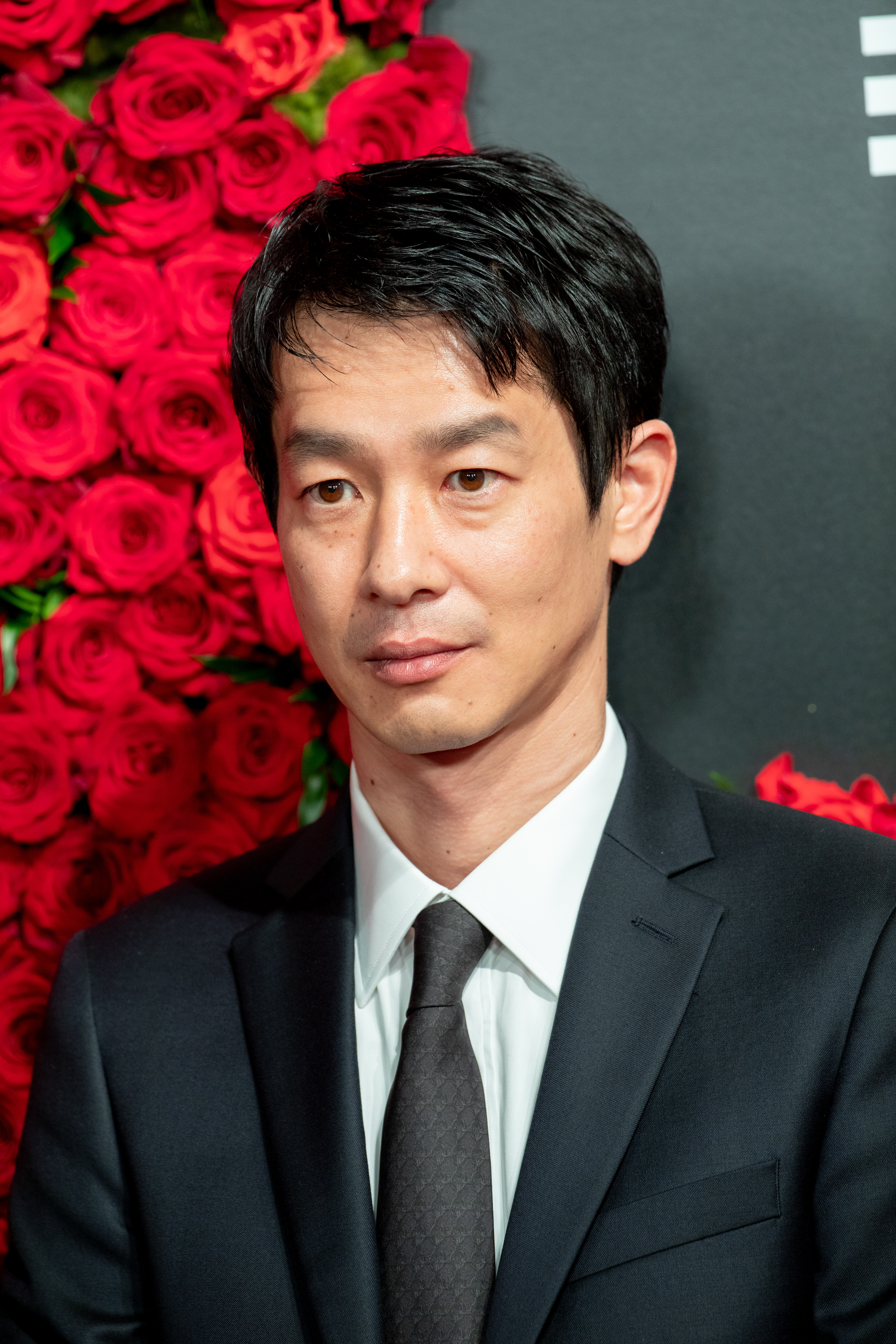 第30回 東京国際映画祭 オープニングセレモニー 加瀬亮 (鈴木家の嘘)